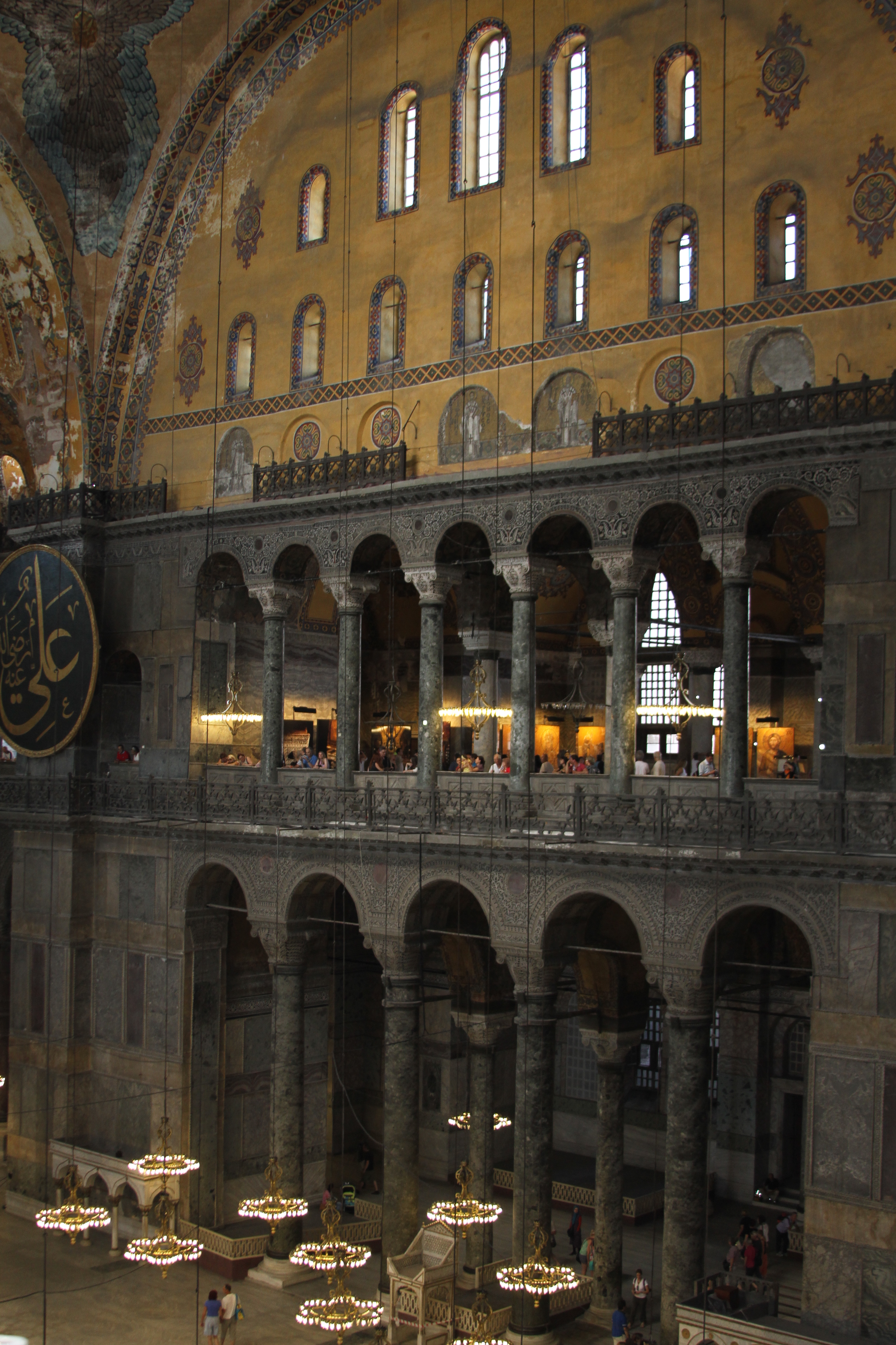 Interior de Hagia Sophia